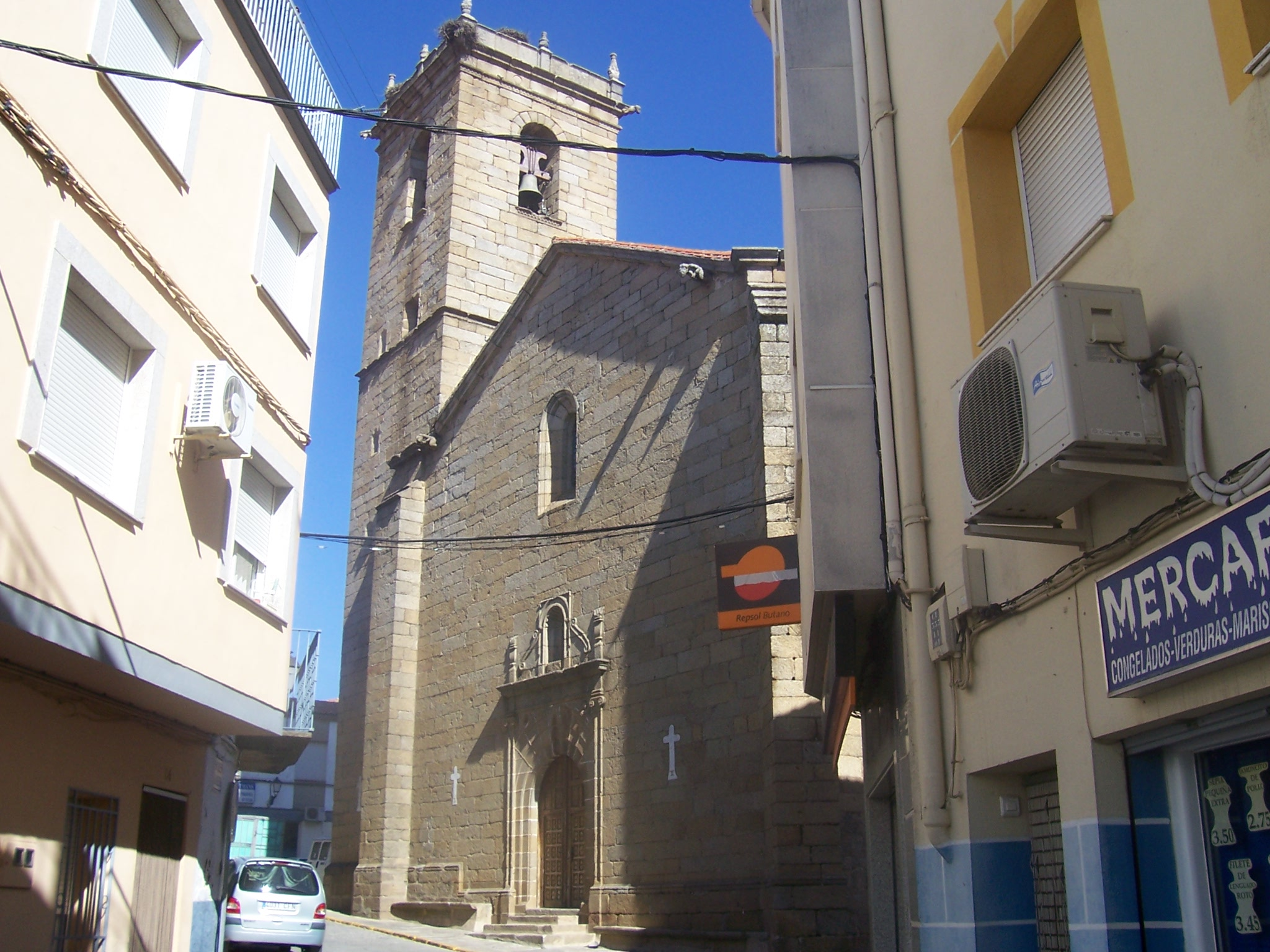 Iglesia Parroqial Nuestra Señora de la Asunción, en Montehermoso, Cáceres, España